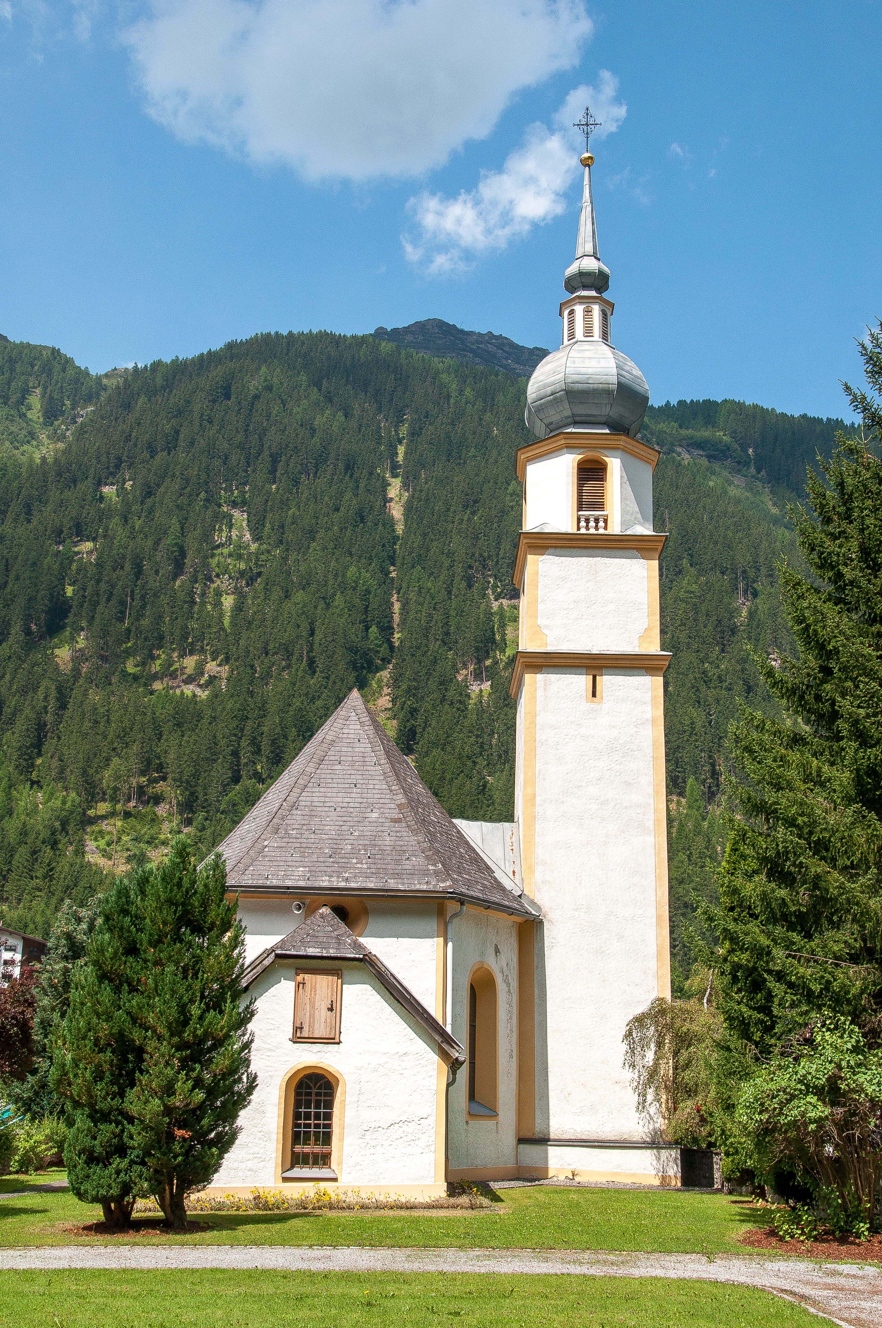 Kath. Pfarrkirche Hl. Dreifaltigkeit